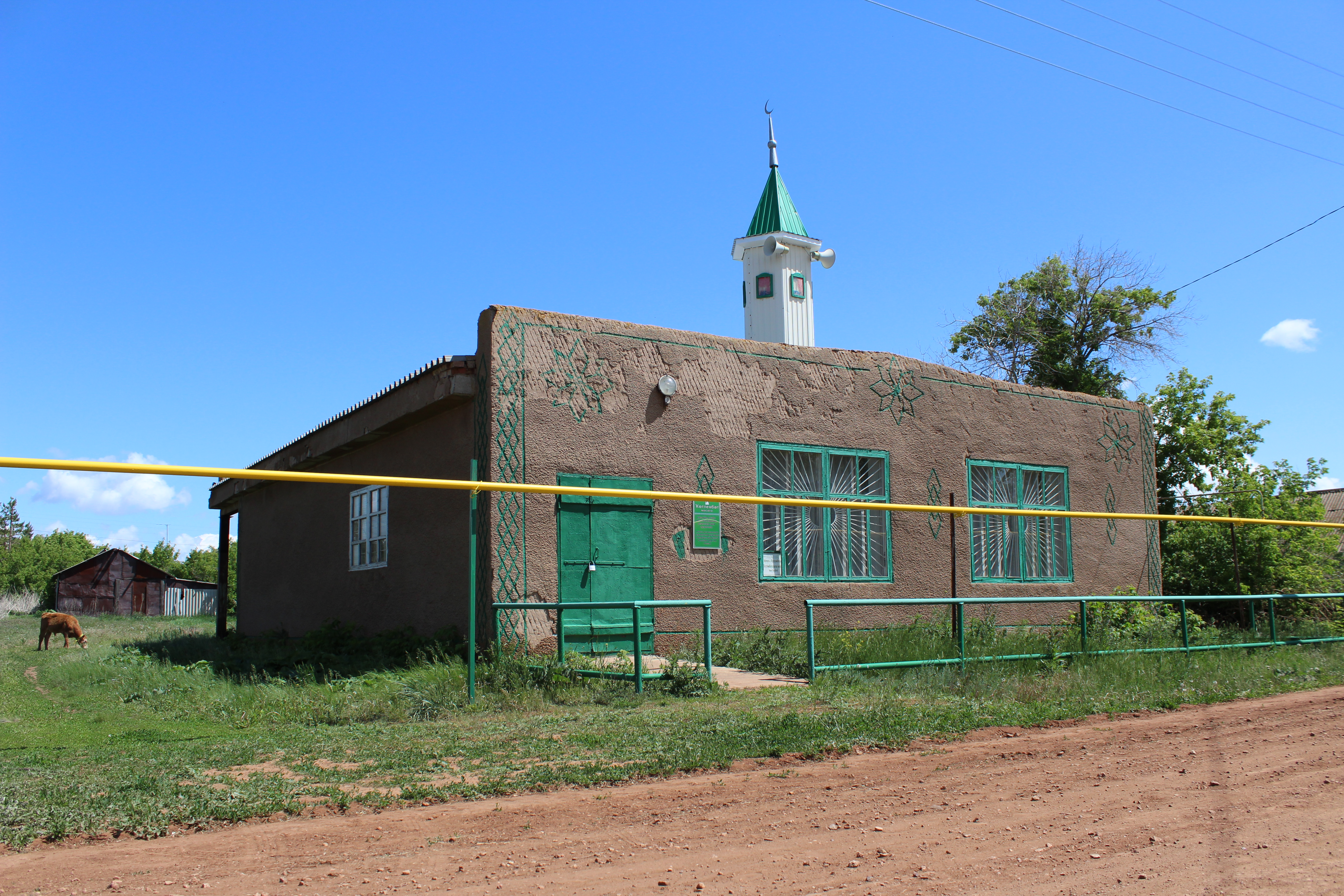 Башҡортса: Туҡ-Соран, Ҡотләмбәт ауылы мәсете